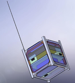 Chasqui 1